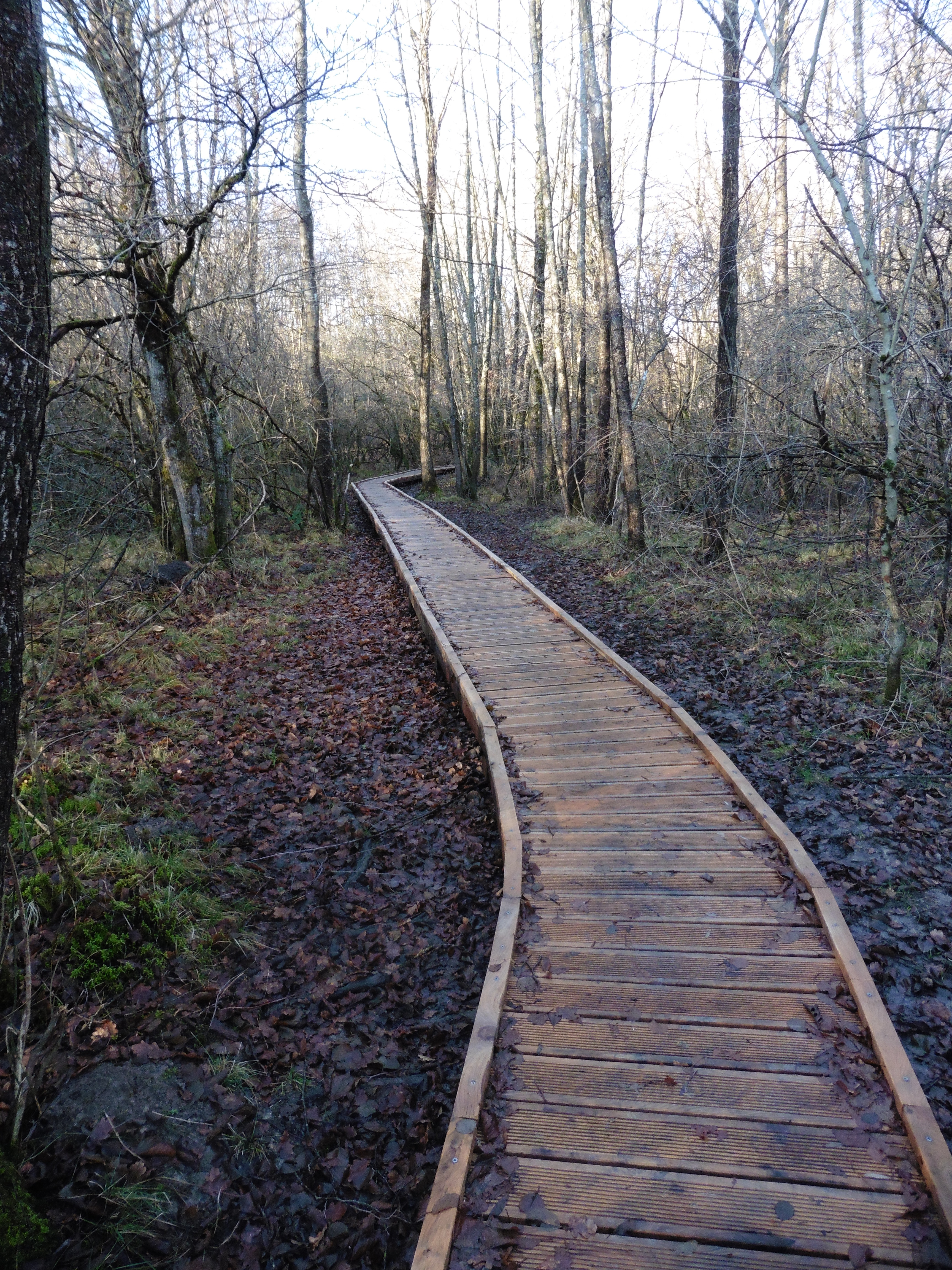 Chemin